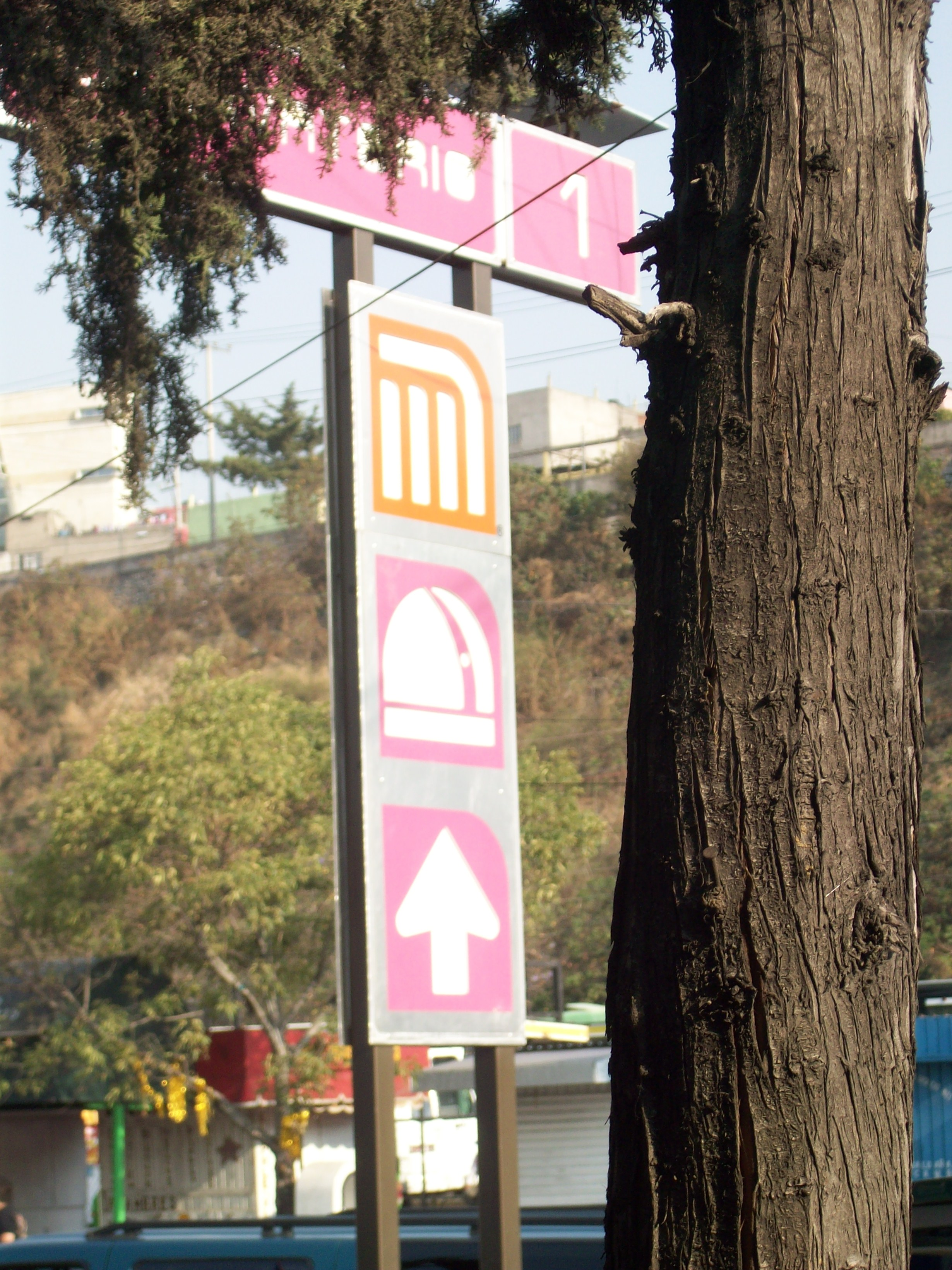 Letrero estacion observatorio